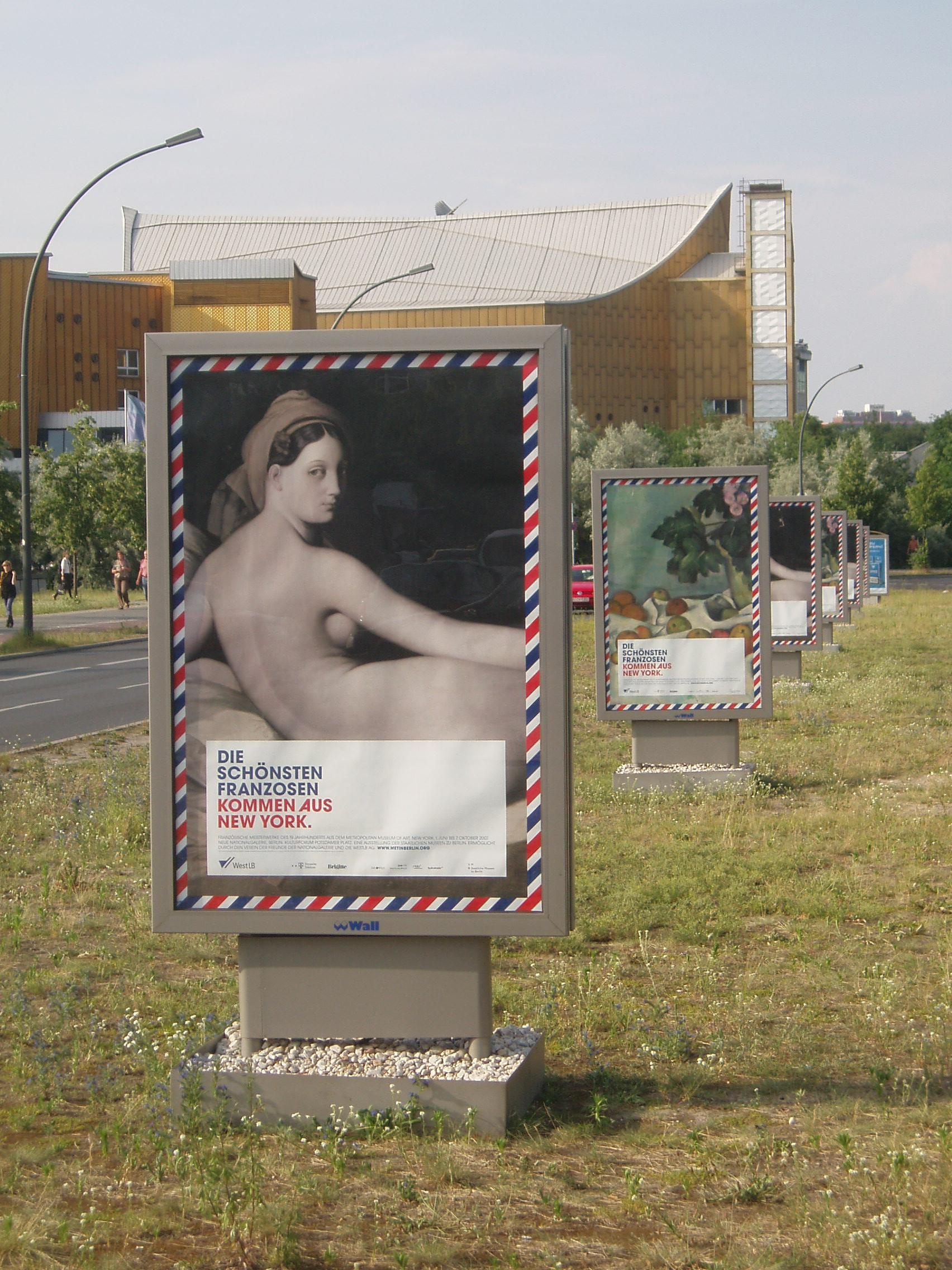 Berlin - Berliner Philharmonie mit Potsdamer Straße